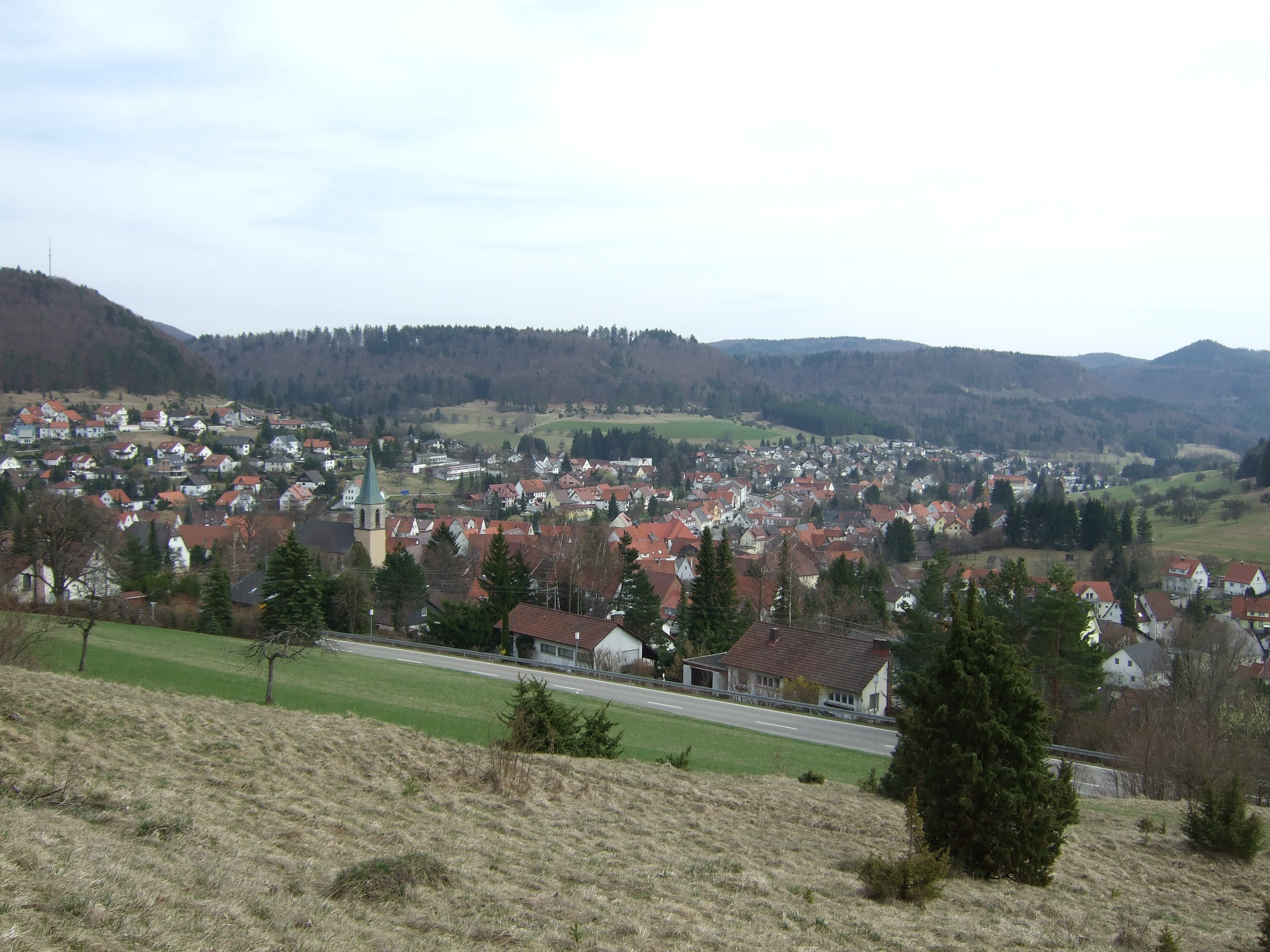 Pfeffingen Albstadt Panorama